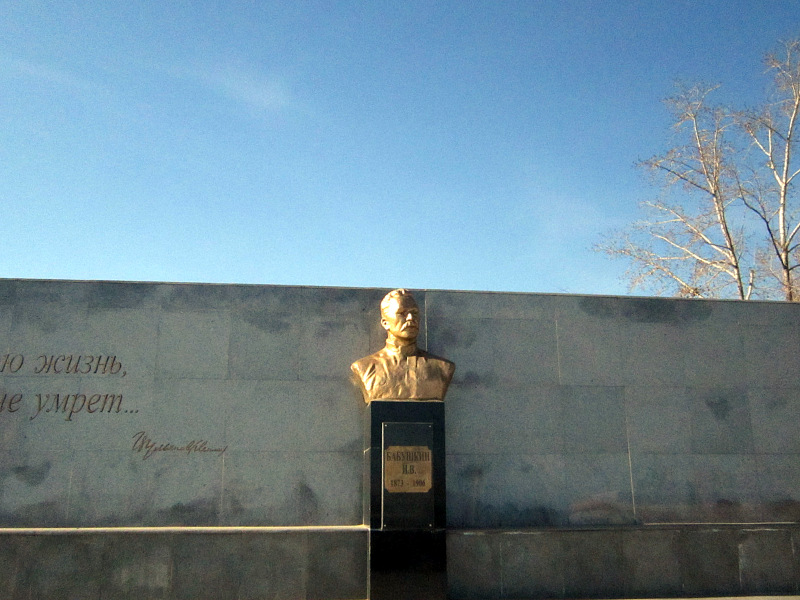 Бюст Бабушкина у гимназии № 29 на улице Бабушкина.